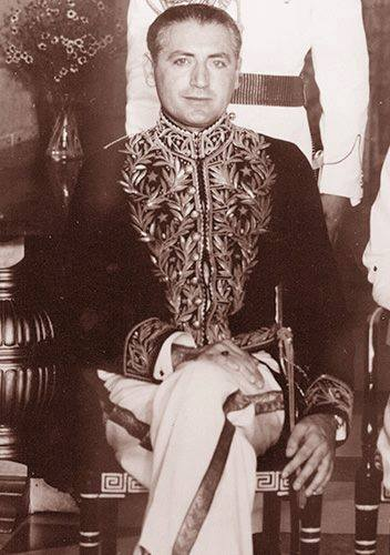 Miguel Serrano como embaixador na índia, 1957